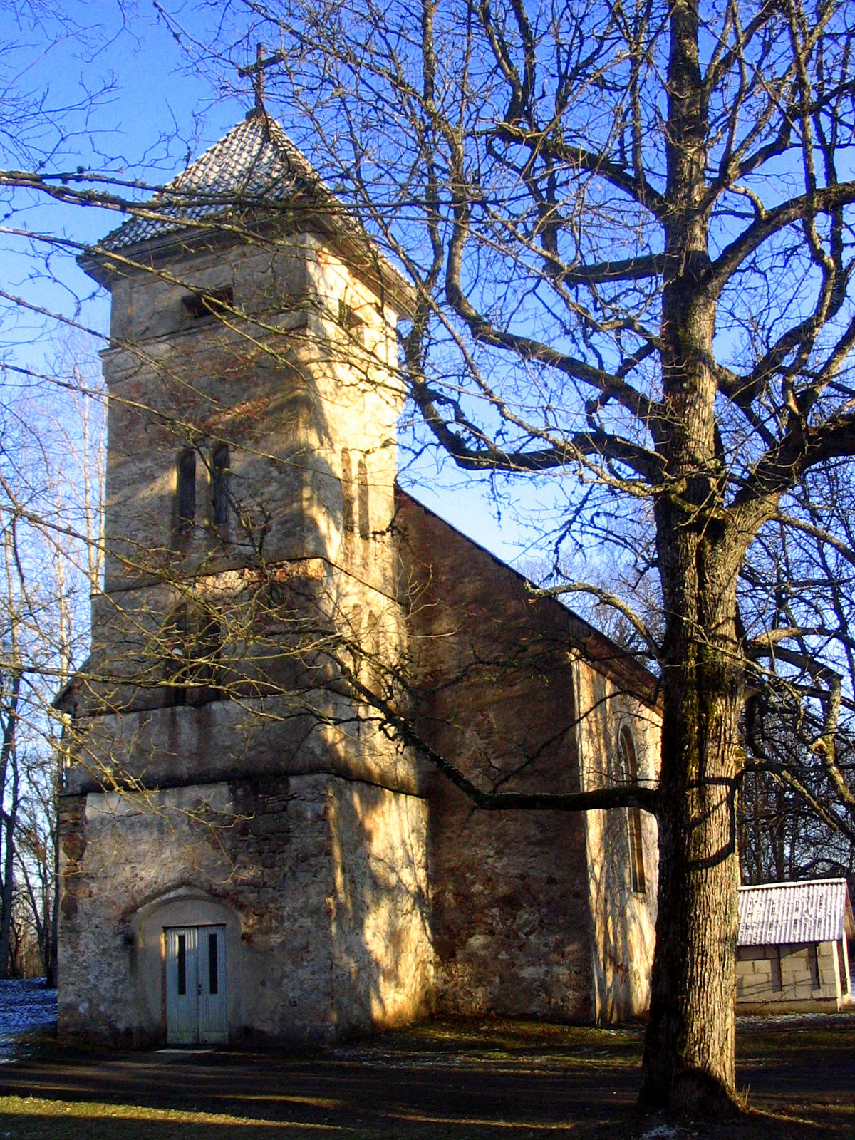 Snēpeles luterāņu baznīca